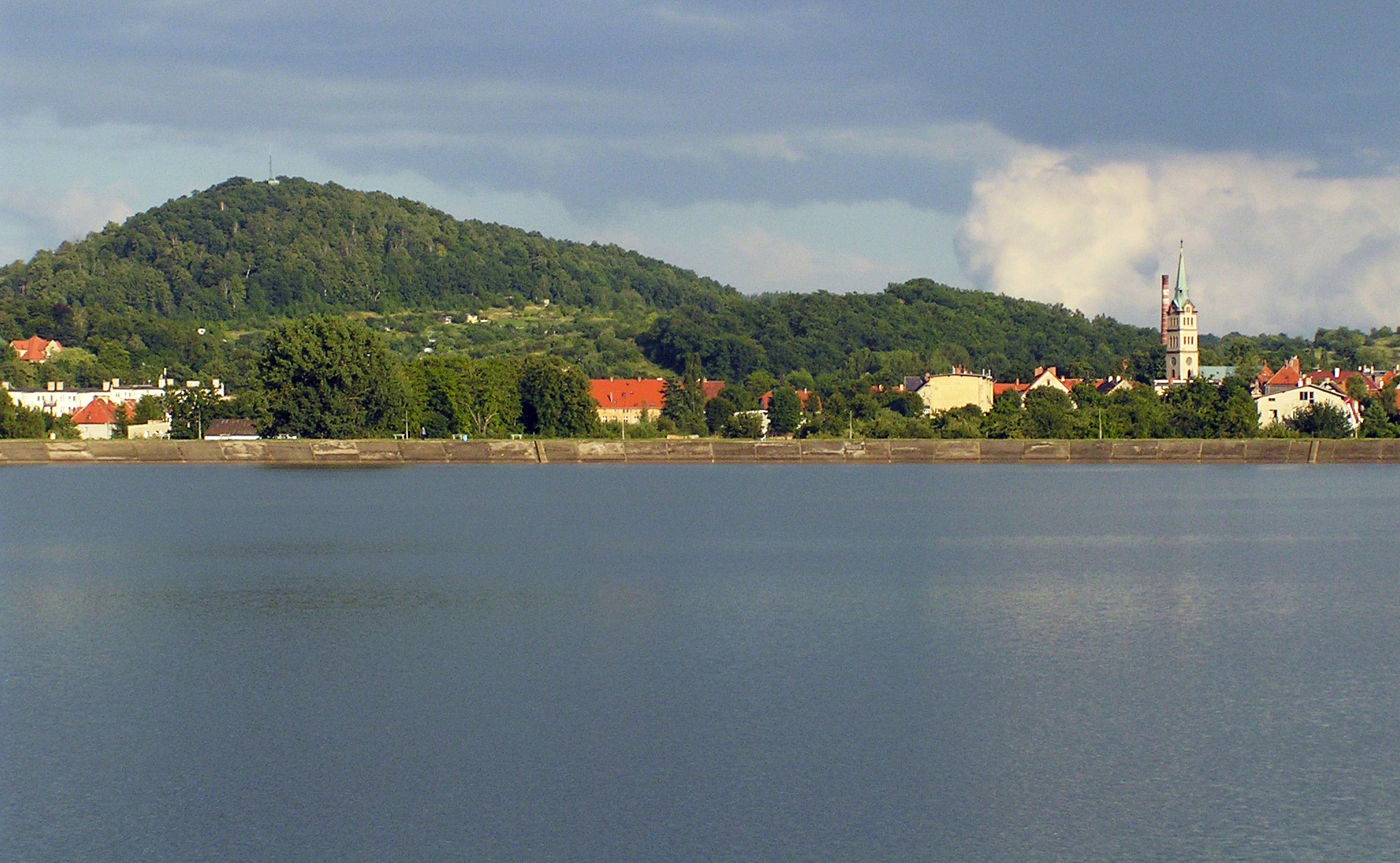 Widok od strony Zbiornika